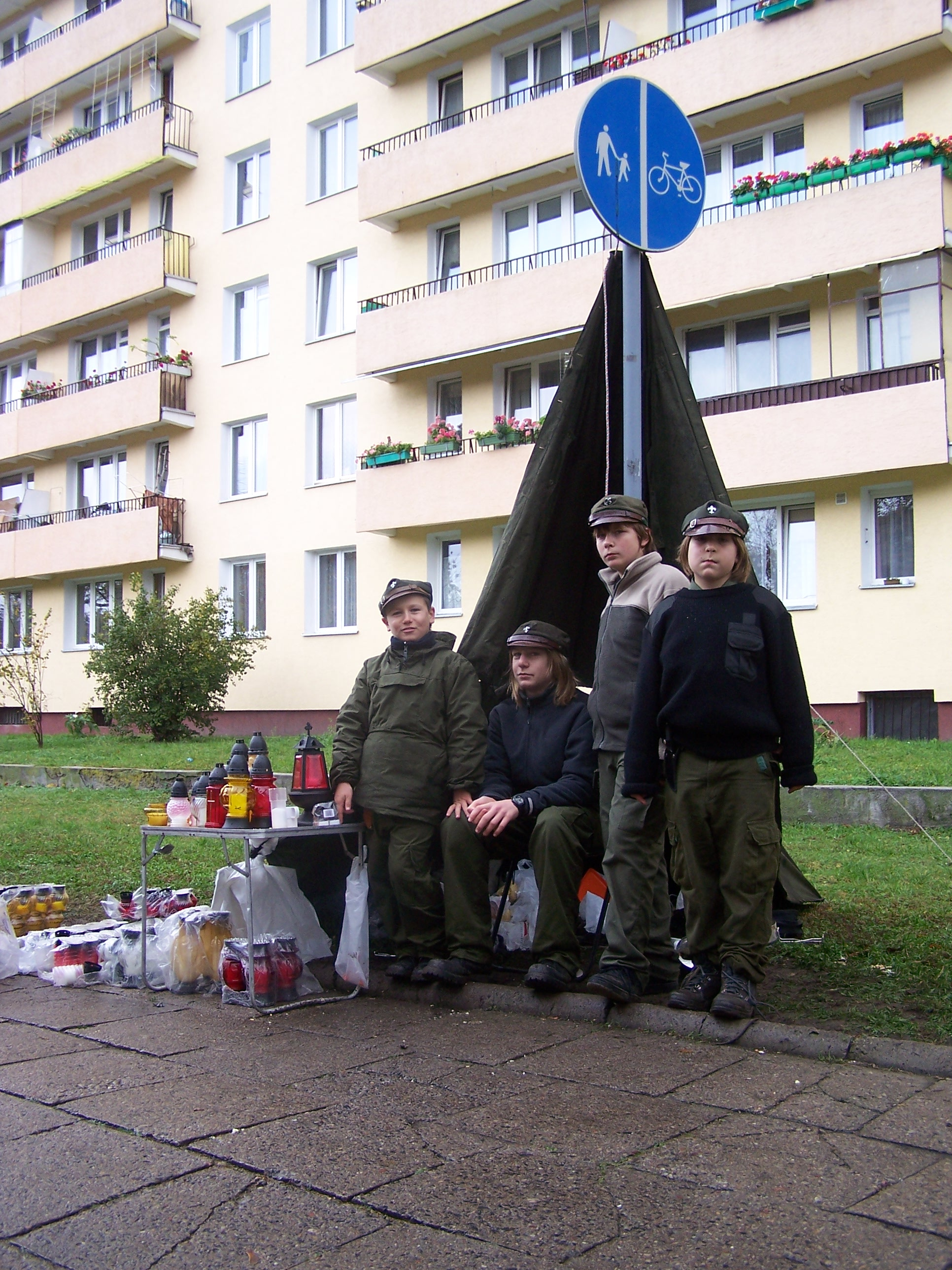 Niedziela przed Dniem Wszystkich Świętych. Cmentarz Bródnowski. Zastęp "Ziemia" drużyny "Żywioł" ze szczepu 208 WDHiZ im. batalionu Parasol ( zarabia na letnie obozy.